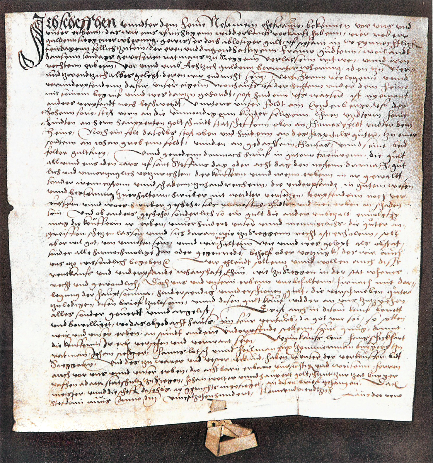 Kaufvertrag zwischen Hen & Nesa Scheff und Gudte Sondag vom 2.8.1549.Transkription: Scheff Hen undter dem Heine, Nesa, seine Ehefrau, verkaufen auf einen Wiederkauf 4 Rädergulden Siegener Währung ablösiger Gult Stephani in weihnachtlichen Feiertagen fällig, der Gudte, Witwe Hans Sondags, Ratsmann zu Siegen, für 80 Gulden berührter Währung. Zur Sicherheit verpfänden sie ihr eigenes Wohnhaus auf der Huttenn unter dem Hain, stößt hinten auf das Wasser, außerdem ihr Feld am Lyndenberge, auf der Hohenn Fore, stößt vorn an die unmündigen Kinder des verstorbenen Chuen unterm Hain, hinter an Hauppert Goltschmit, Stadtschöffe, oben an Thomas Feld unter dem Hain, noch ein Feld daselbst, stößt oben und hinten an des Hospitals Güter, zu einer Seite an des Johan Grebe Feld, unten an gedachten Thomas. Weinkaufleute [Zeugen]: Hans Schickhart, Ratsmann, Johan Steltzer, Hanns Latsch und Heilman Fux, Zimmermann, Bürger zu Siegen. Nach dem Schöffen- und Gerichtssiegel Siegen: (Pafhen Adam, Stadtschultheiß zu Siegen, Johan Welter und Hauppert Goltschmit, Bürgermeister)